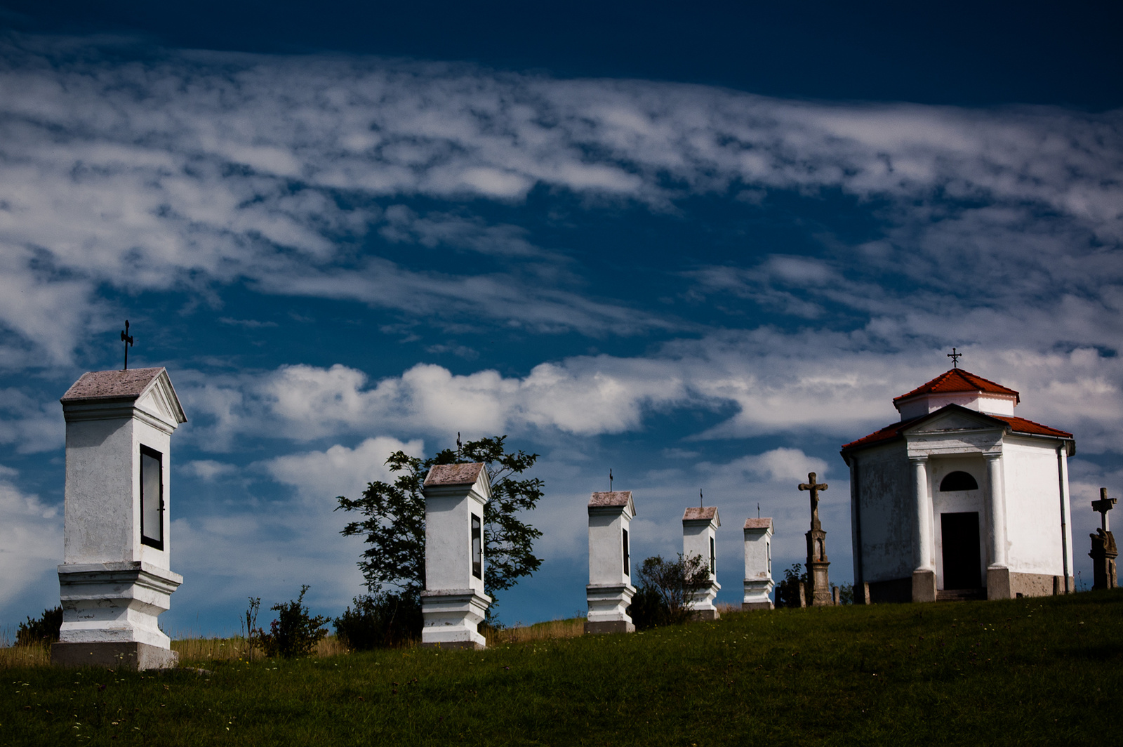 Kálvária kápolna (Vöröstó, )